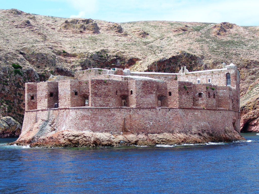 Forte em Berlengas, Portugal